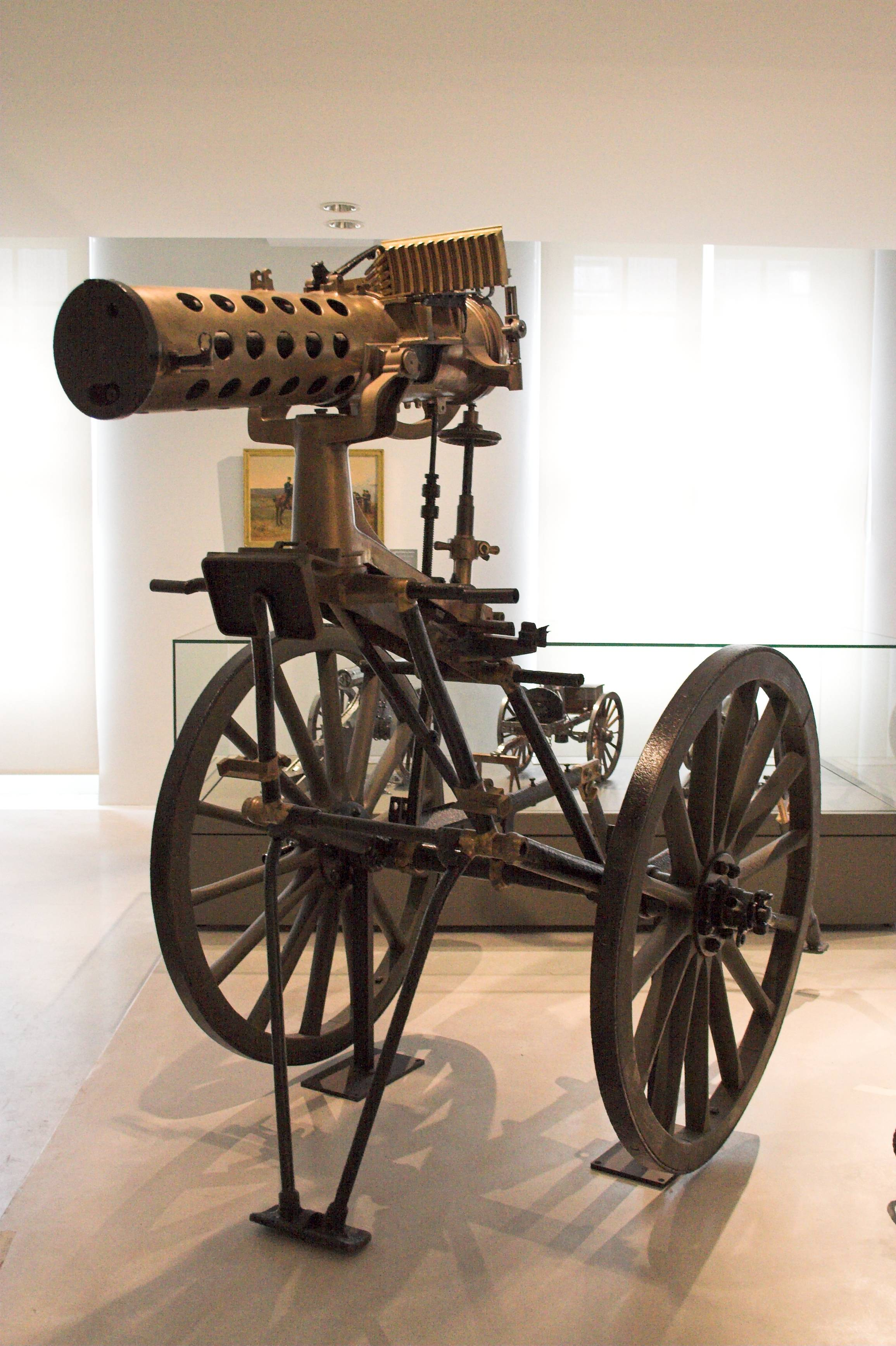 Mitrailleuse Gatling model APX1895(Musée de l'armée, Paris, France)